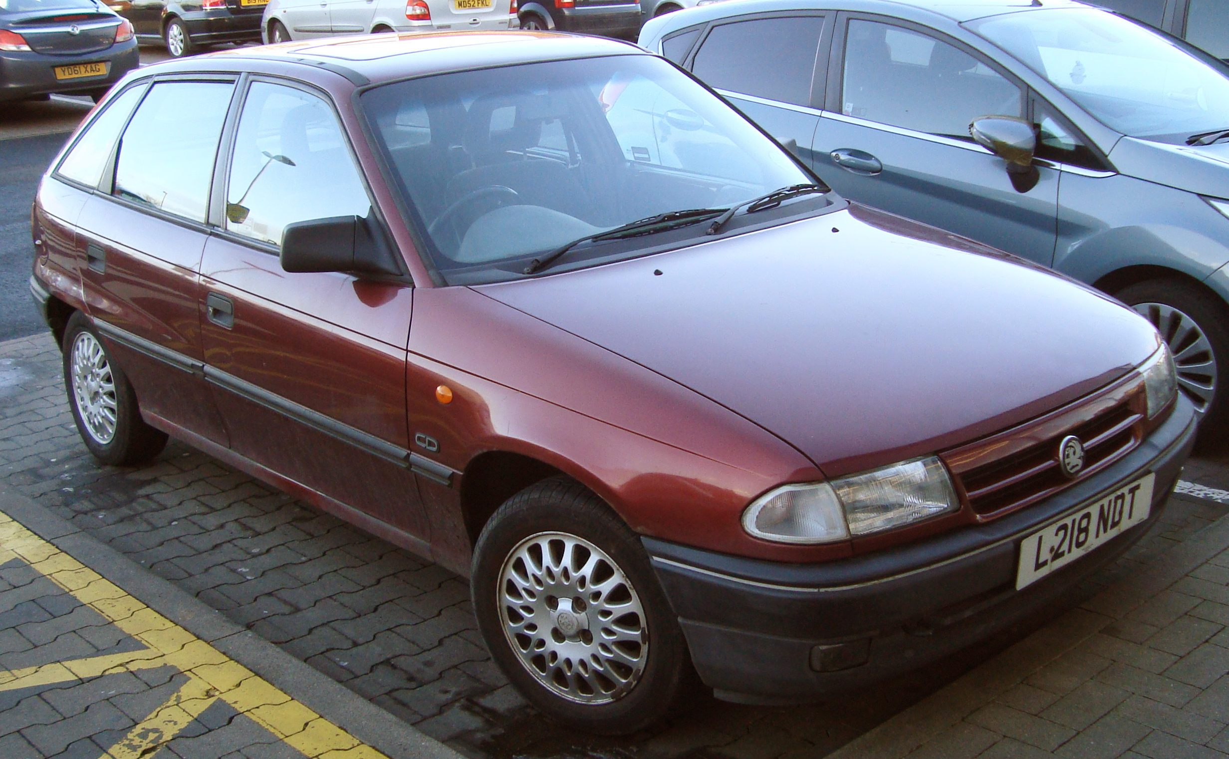 1994 Vauxhall Astra 1.4 CD